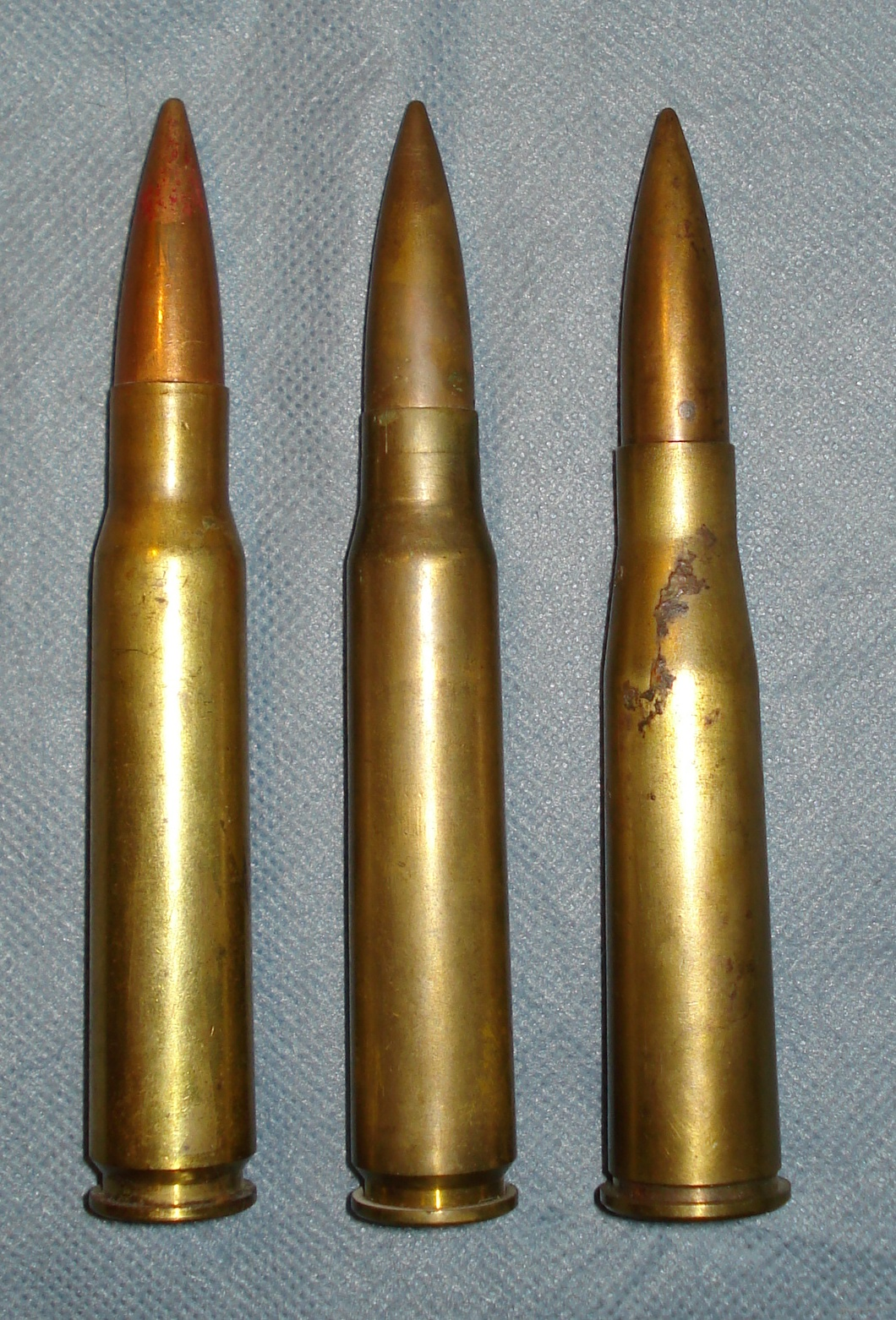 Три различных 13,2-мм патрона в сравнении: - 13,2x99 Hotchkiss; - 13,2x96 Hotchkiss; - 13,2x92SR Tankgewehr.